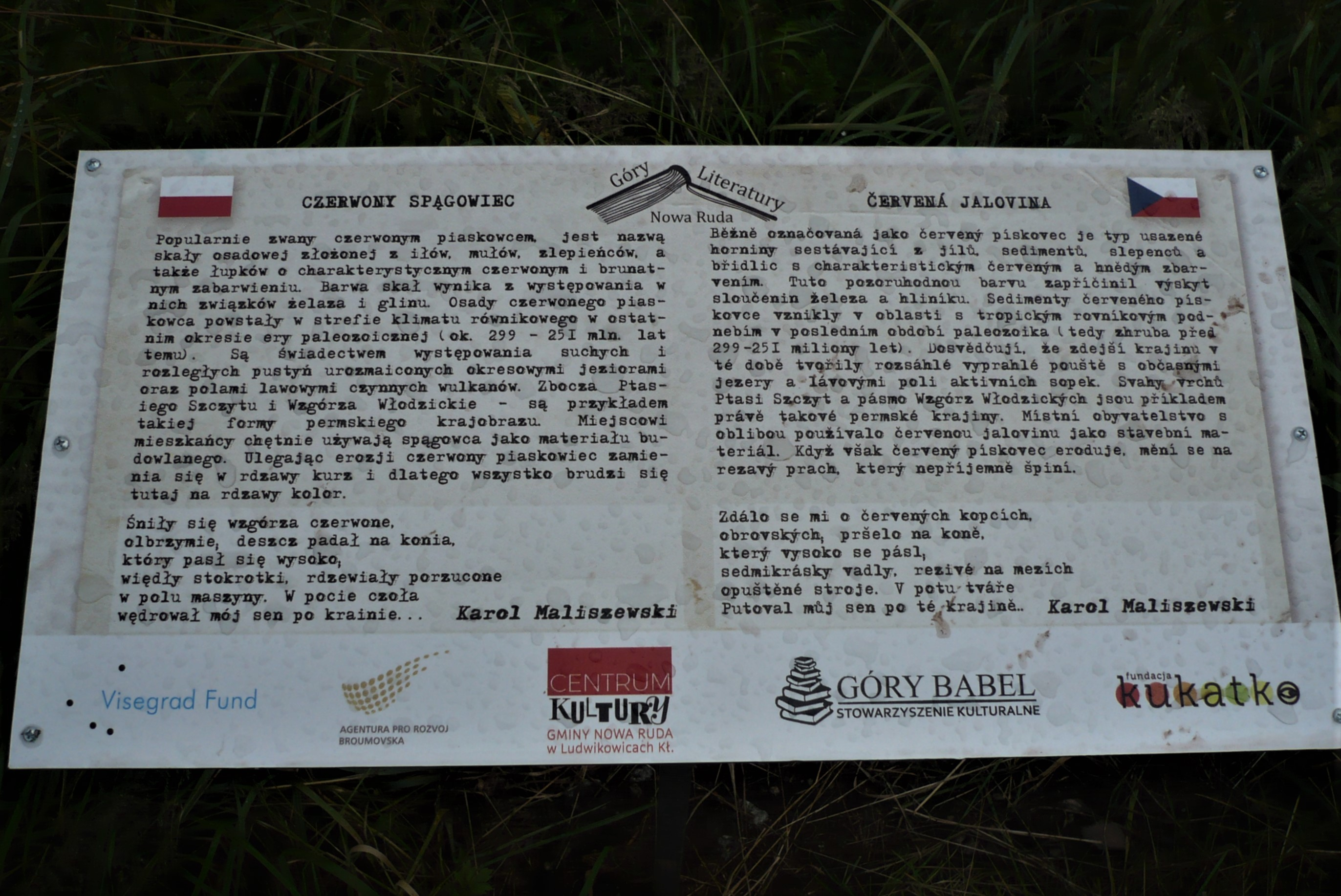 Tablica na Drodze Chlebowej Sonov - Włodowice